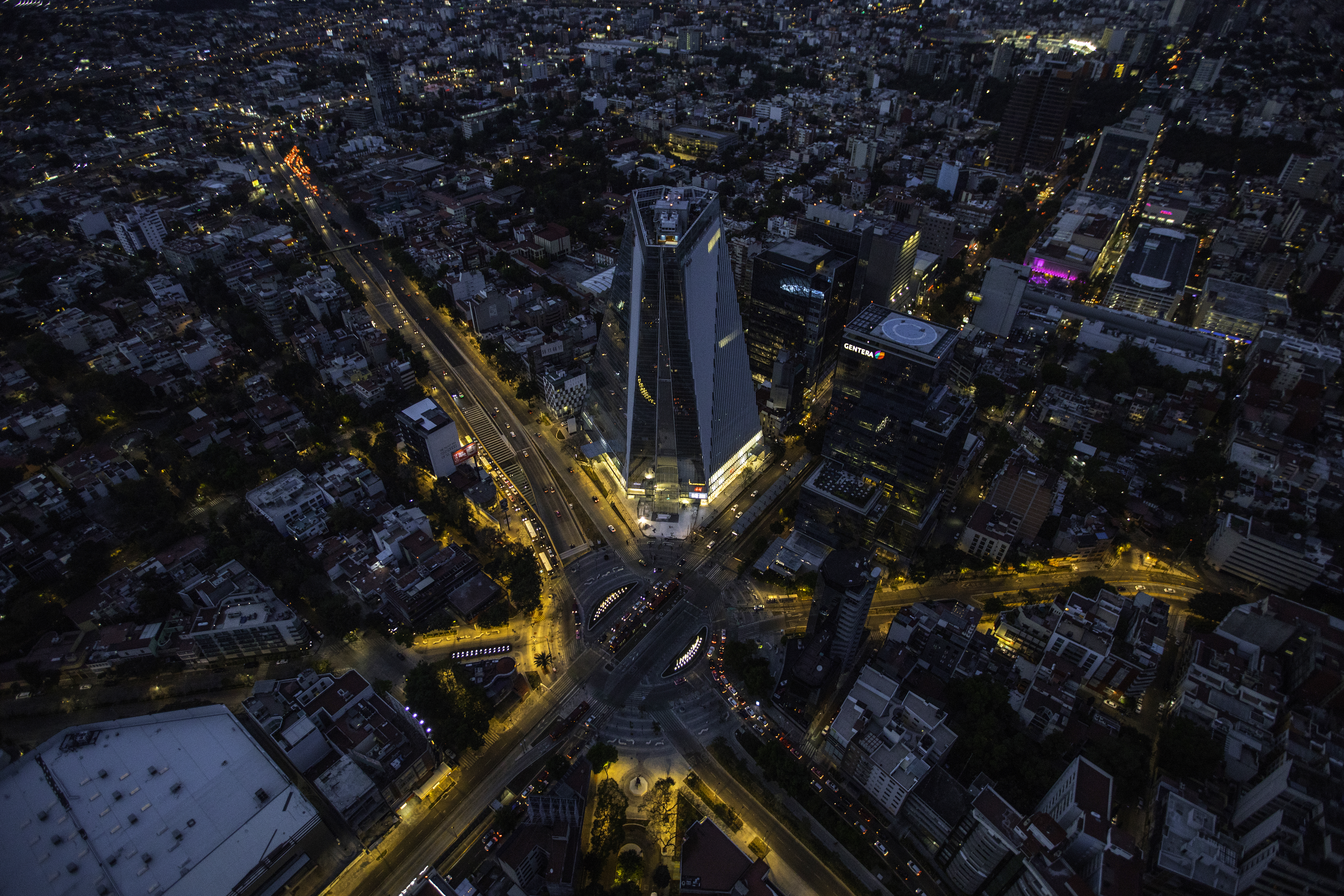 Fotografías de la Ciudad de México desde el aire.